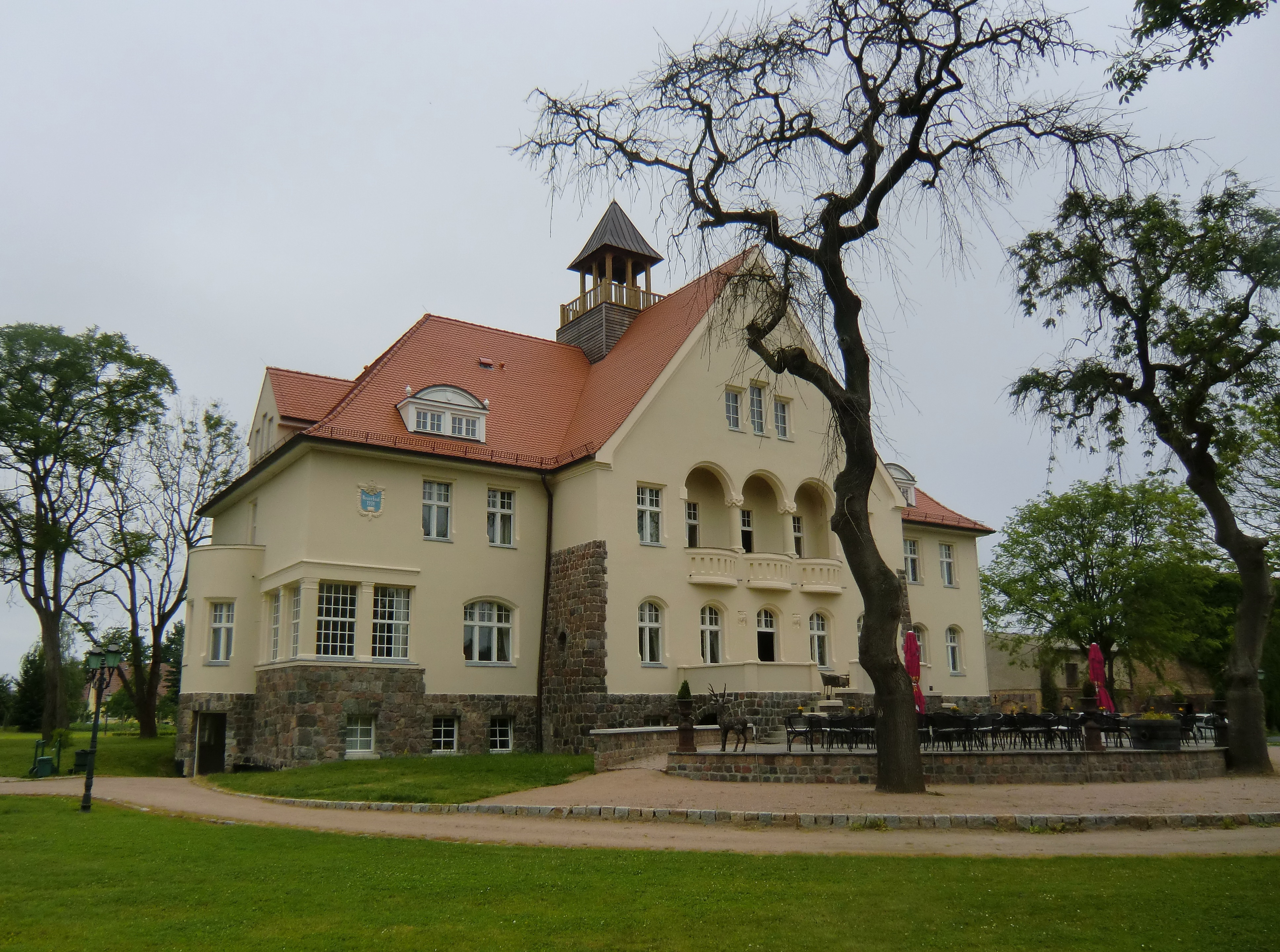 Ansicht des Schlosses Krugsdorf in der Nähe der Stadt Pasewalk in Vorpommern.